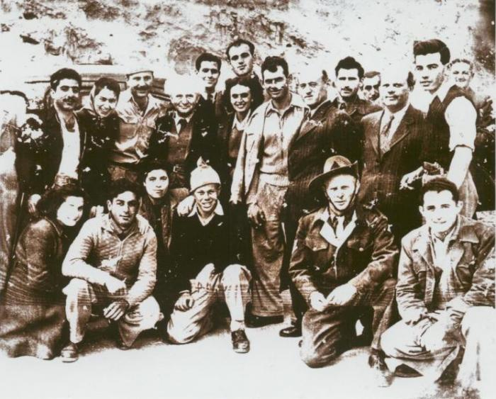 חיילים מצטלמים עם דוד בן גוריון שבא לבקר אותם